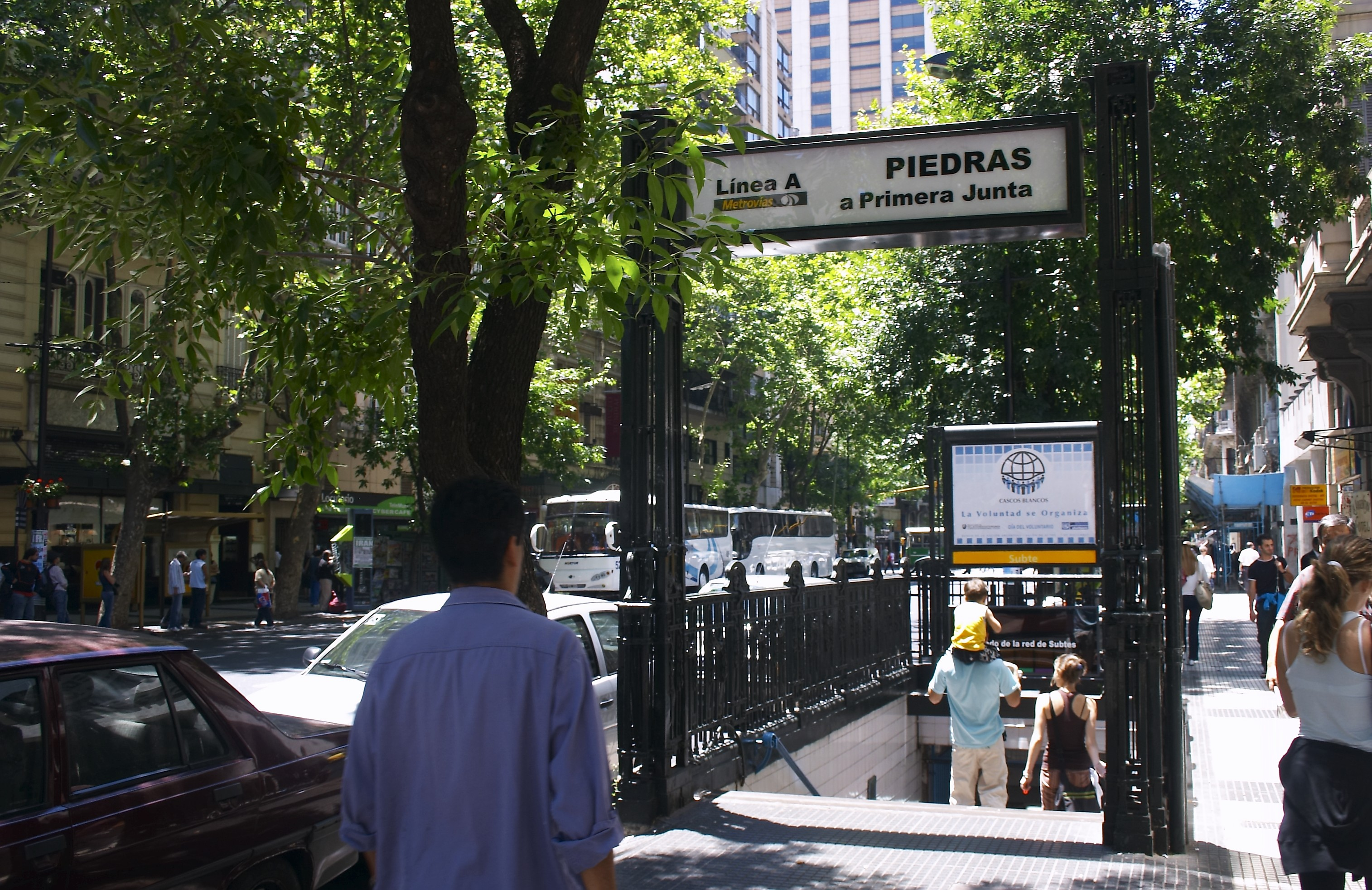 Estación Piedras de la línea A del Subte de Buenos Aires, Buenos Aires, Argentina.